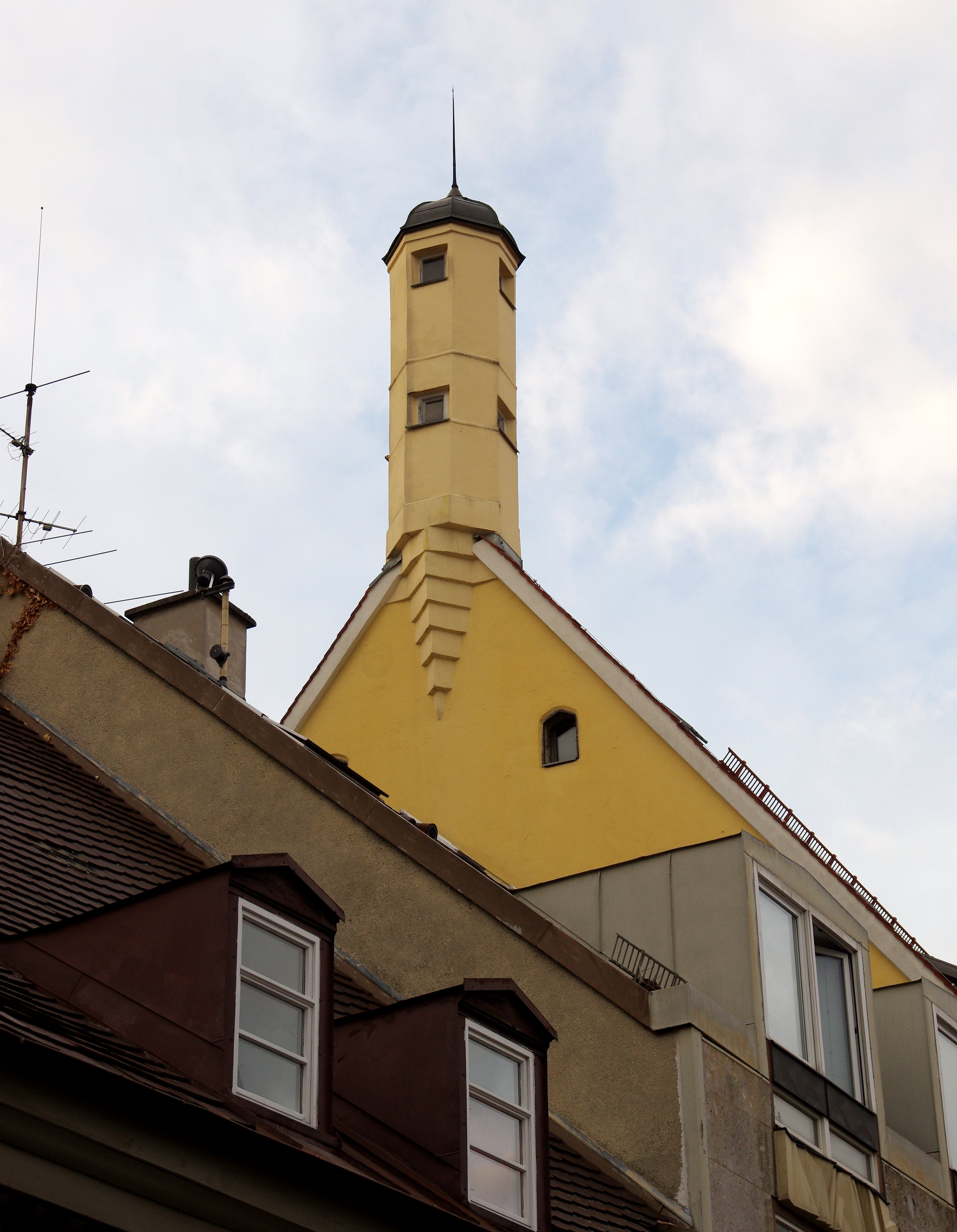 Bilder vom Memminger Stammtisch im November 2012